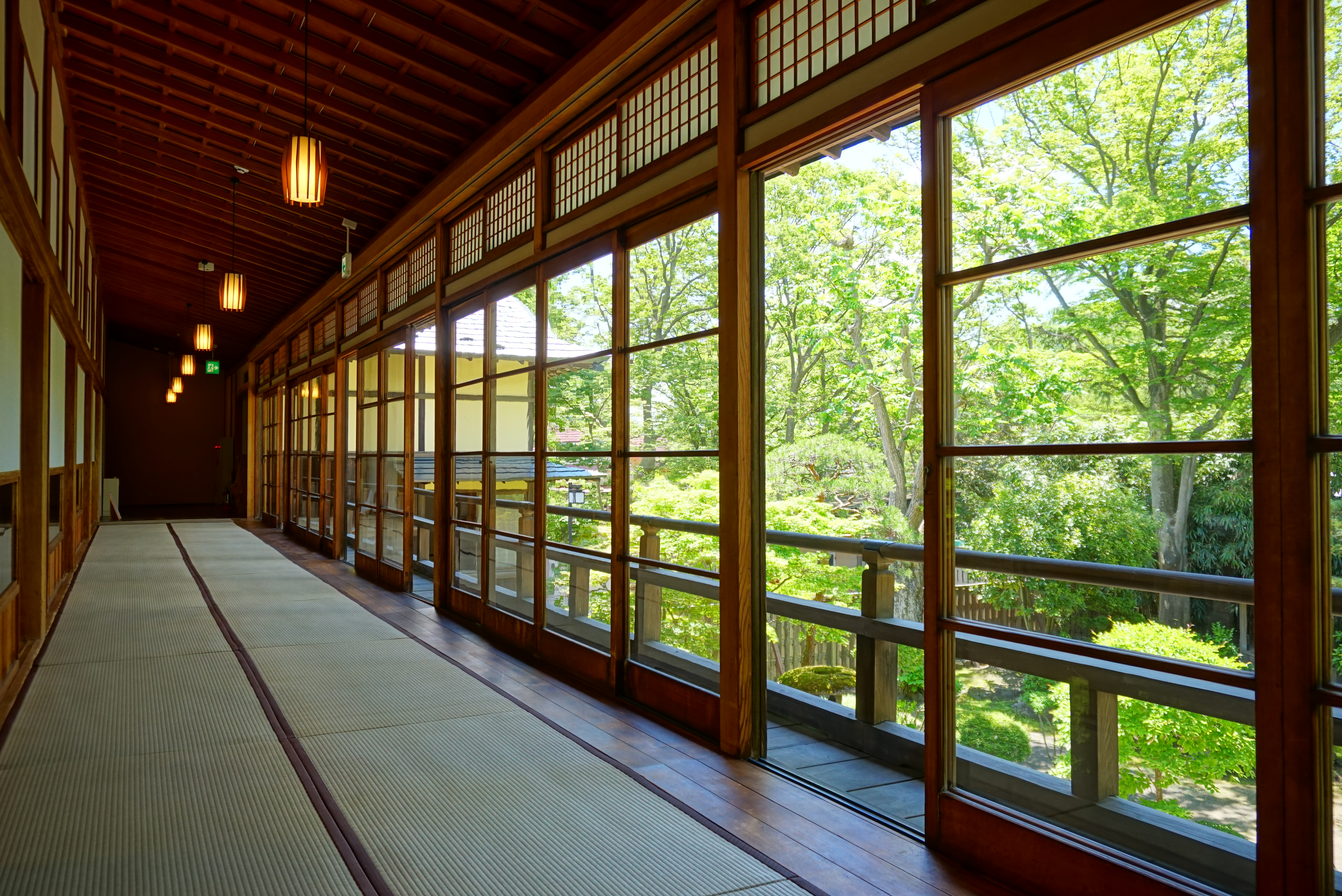 能代市観光交流施設、旧料亭金勇。秋田杉の天然材をふんだんに用いたかつての料亭で、2009年に料亭としては廃業し、施設が市に寄贈された。その後2013年に市の観光交流施設として再オープンしている。国の登録有形文化財に登録された豪奢な建物は、「東洋の木都」と称された工業都市、能代の往時の繁栄を伝える。